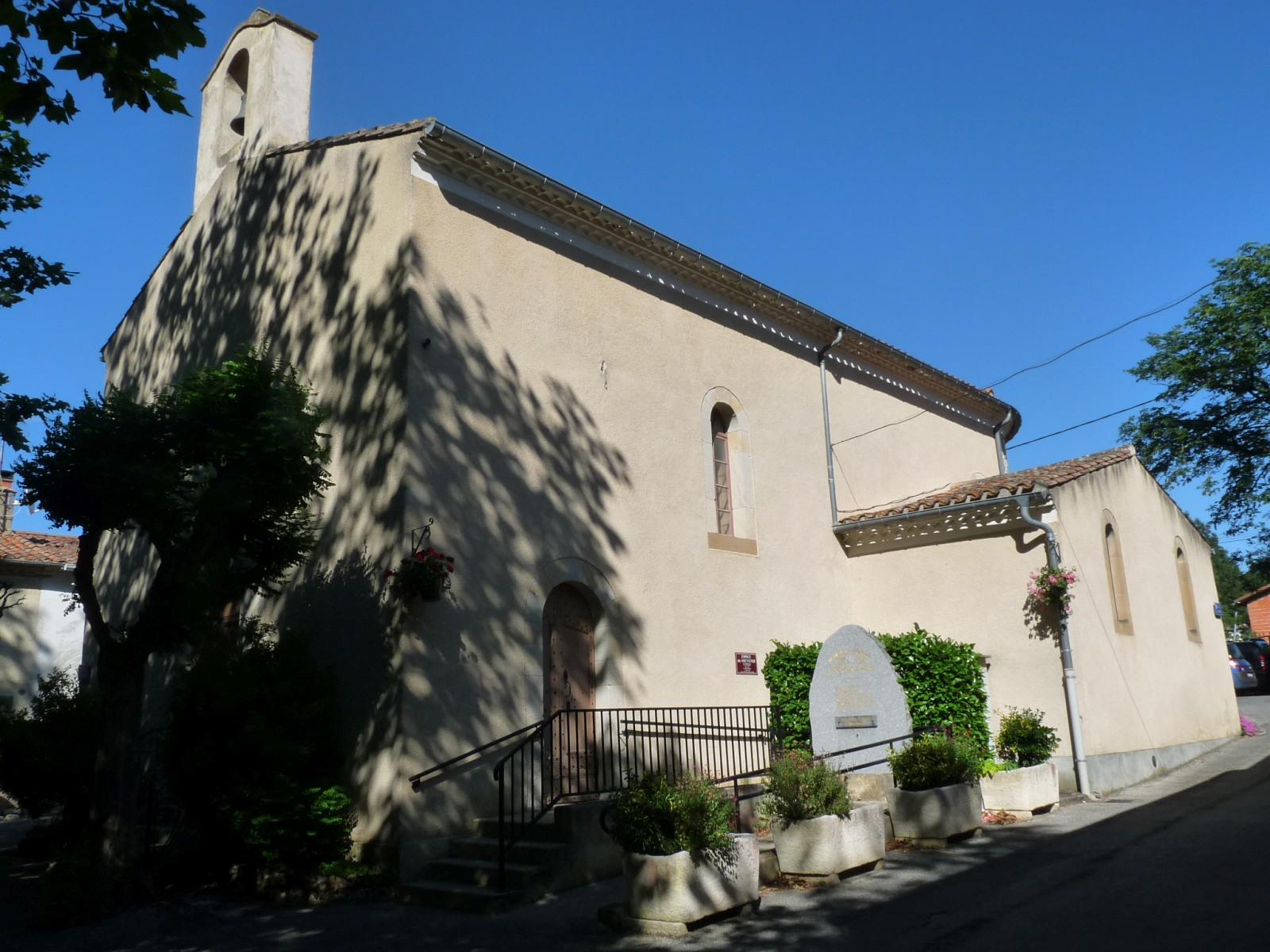 Eglise Saint-Jean-Baptiste de Vaudreuille, Haute-Garonne, France